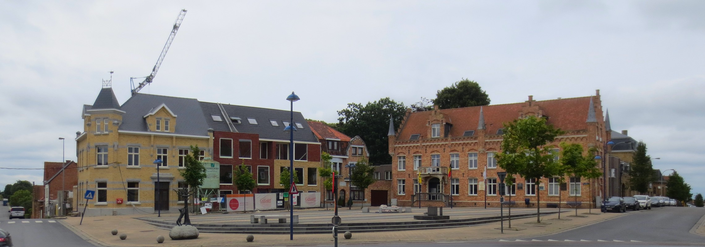 Passendale